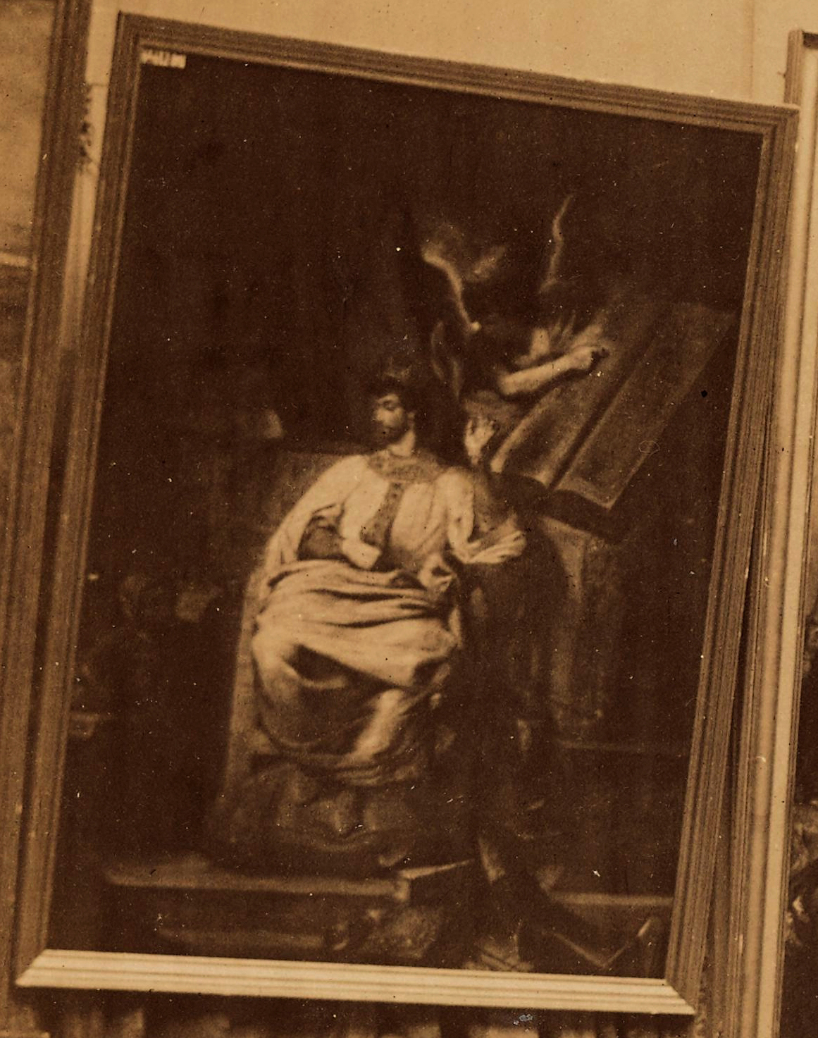 El cuadro destruido de Delacroix "Justiniano redactando sus leyes" visto en una fotografía de André Adolphe Eugène Disdéri de un salón de la Exposición Universal de París (1855) dedicado a la obra de Delacroix. La obra, pintada para la sede del Consejo de Estado en París, en el Palacio de Orsay, quedó destruida en el incendio del edificio durante los sucesos de la Comuna de París, en mayo de 1871.